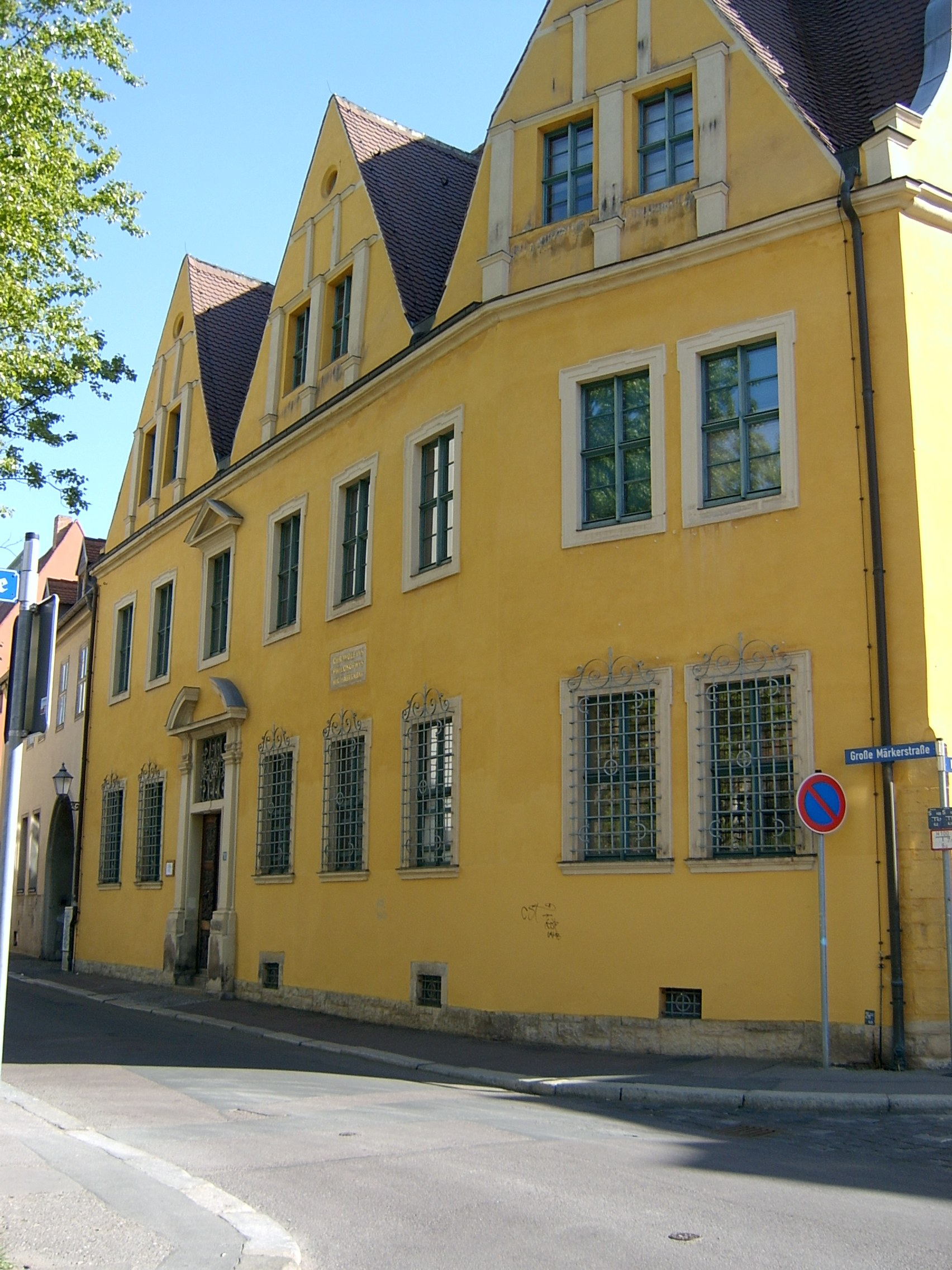 Große Märkerstraße 10 in Halle (Saale)